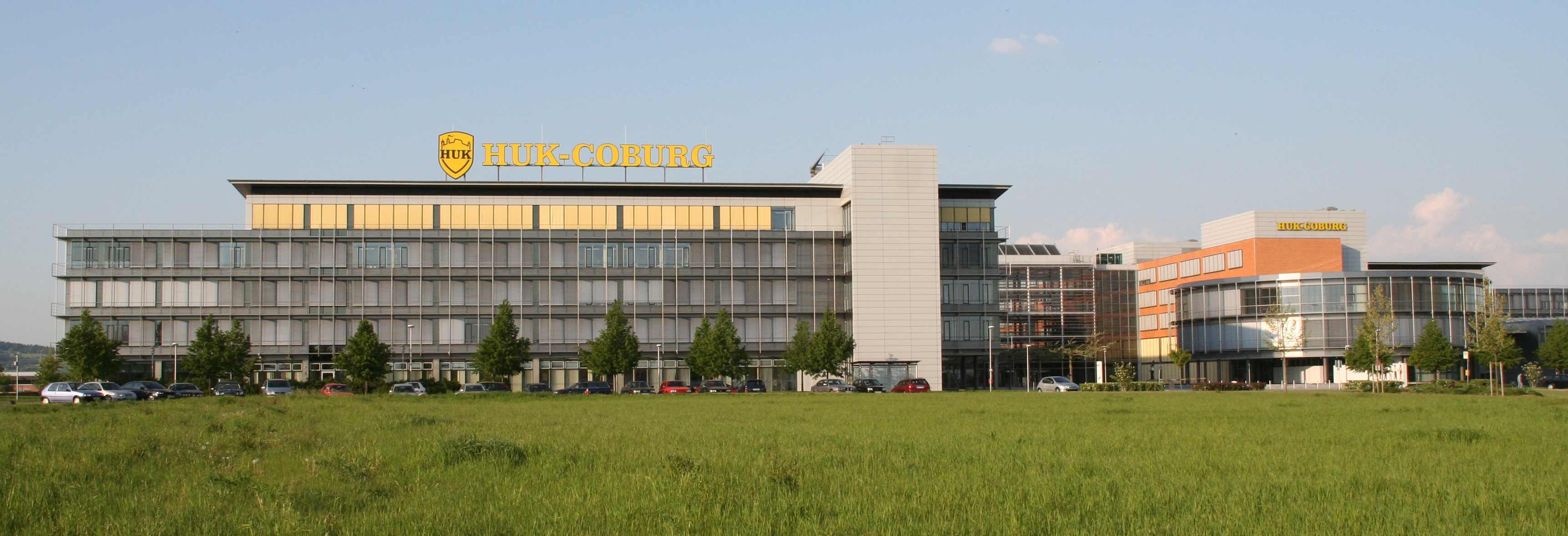 HUK COBURG Bertelsdorfer Höhe in Coburg